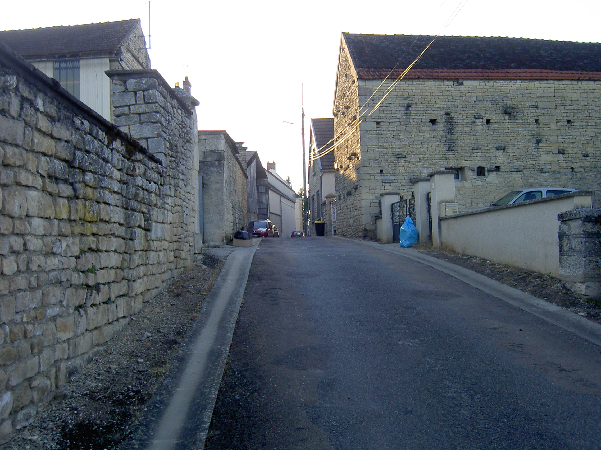 Une rue de Pacy-sur-Armançon